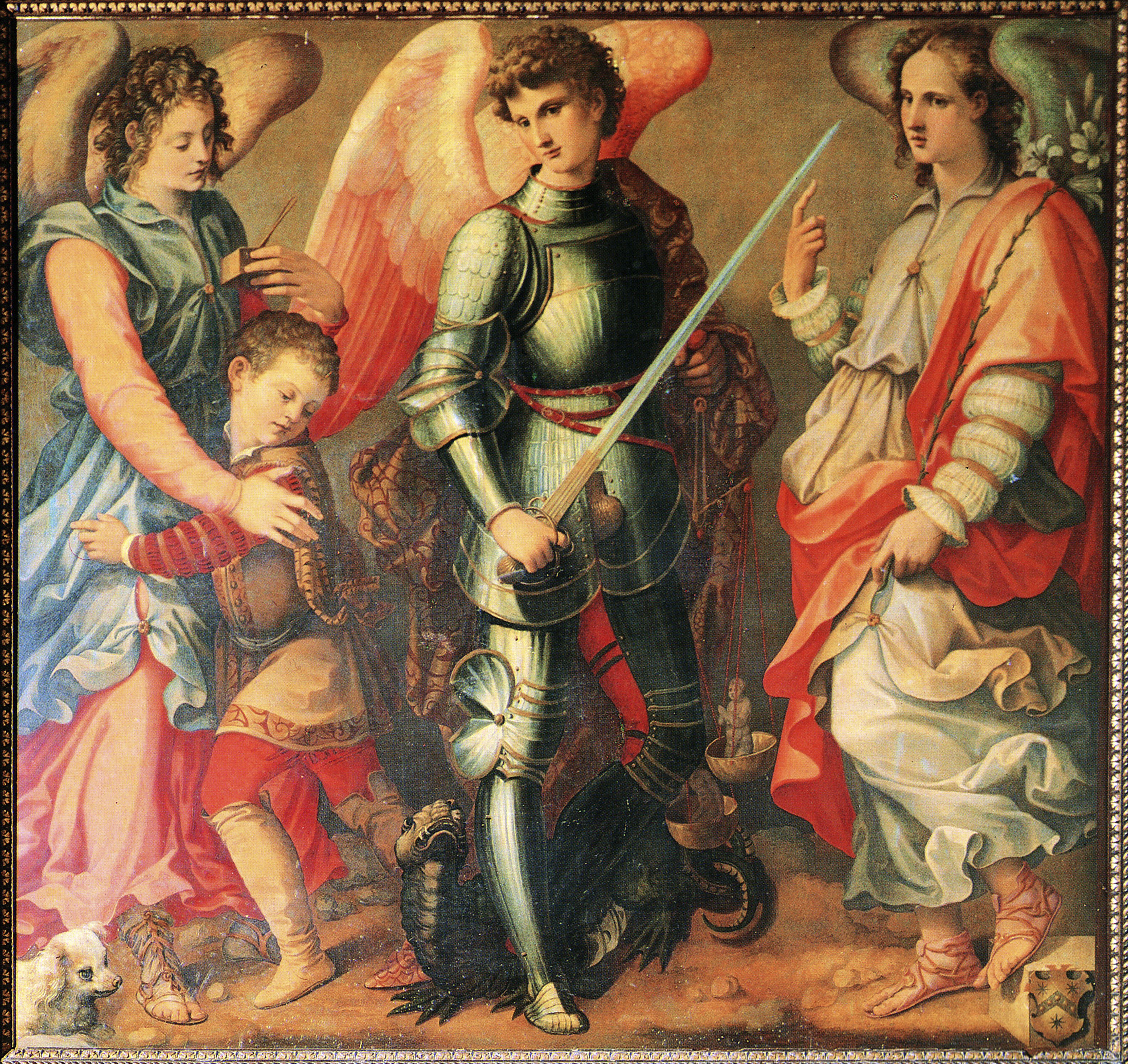 Gli Arcangeli Raffaello, Michele e Gabriele- olio su tela di Michele Tosini (Michele di Ridolfo del Ghirlandaio), Badia a Passignano